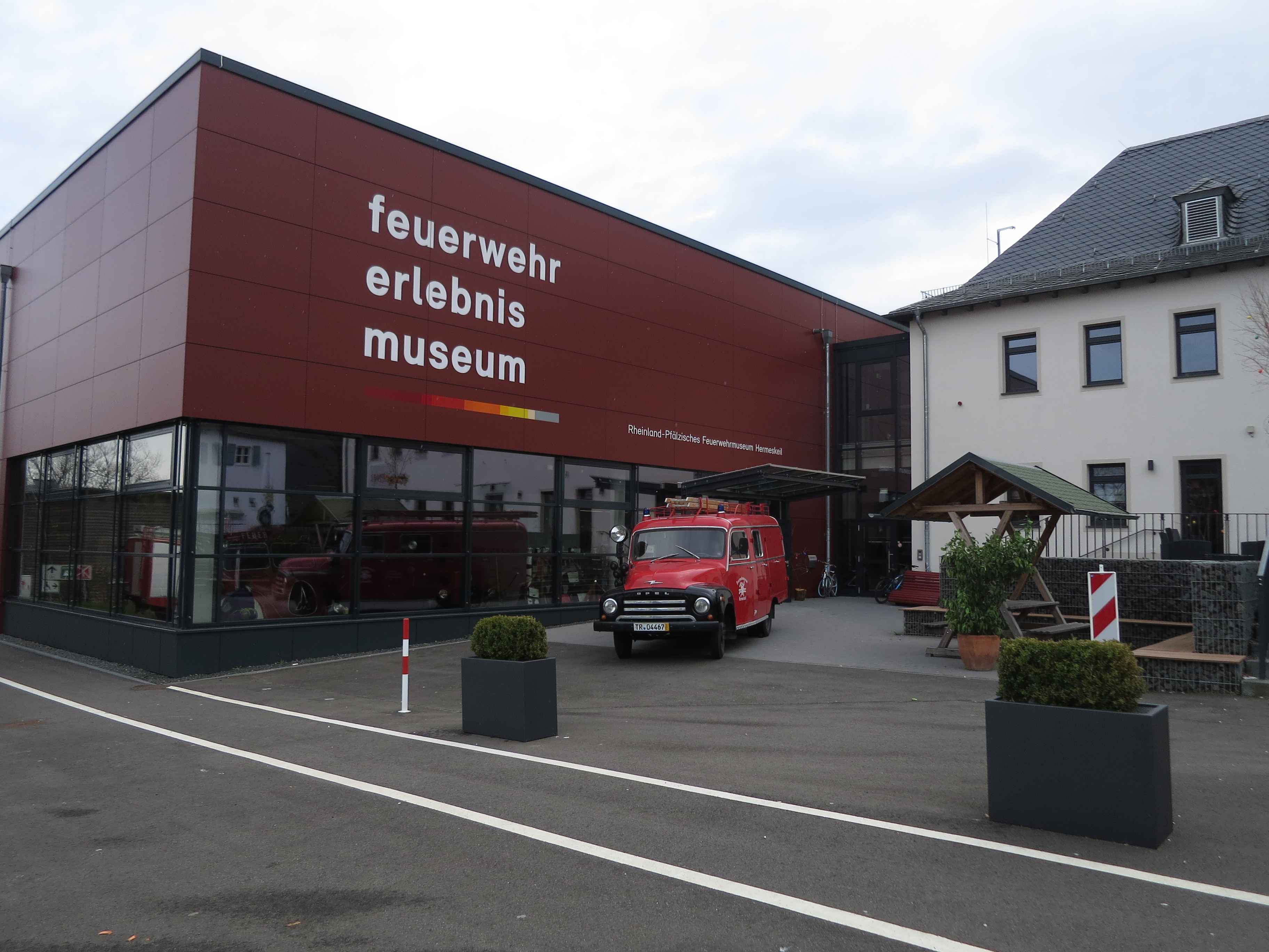 Neubau des Feuerwehrmuseums Hermeskeil mit angeschlossener Gastronomie.